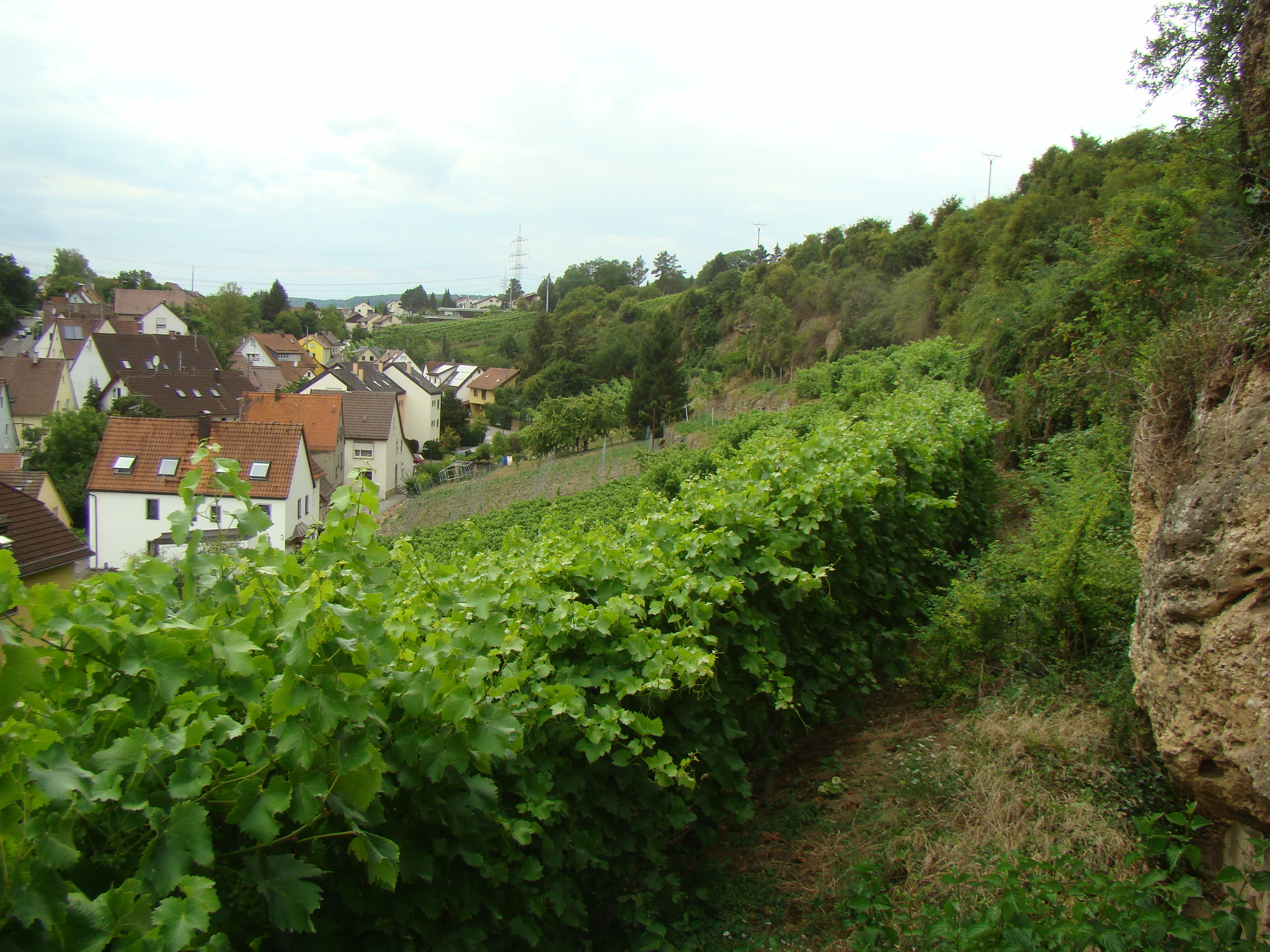 Heilbronn-Klingenberg, Weinberge beim Unterdorf